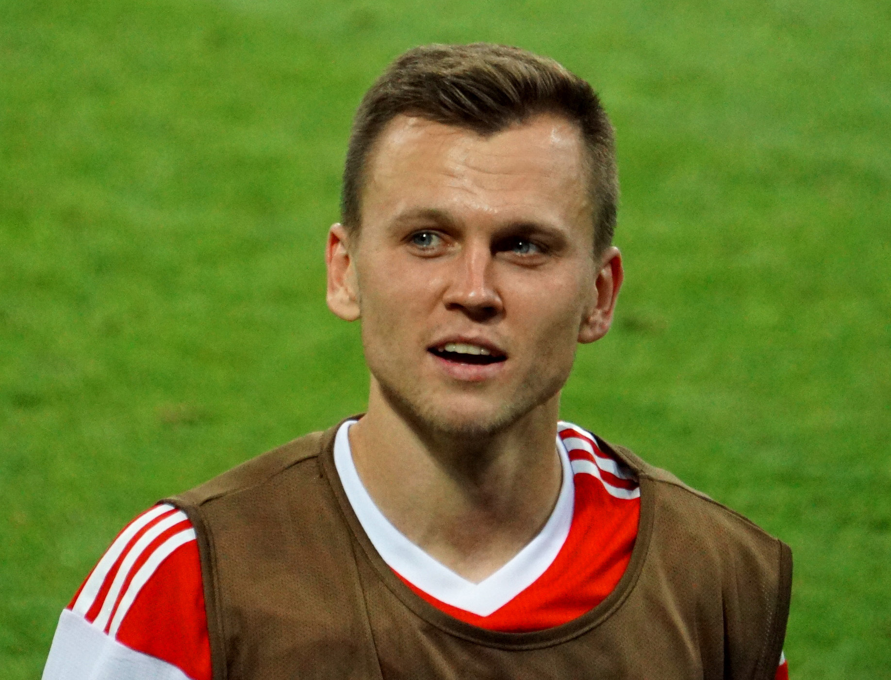 Дени́с Дми́триевич Че́рышев (род. 26 декабря 1990, Нижний Новгород, РСФСР, СССР) — российский и испанский футболист, крайний полузащитник испанского клуба «Вильярреал», выступающий на правах аренды за «Валенсию», и сборной России. Заслуженный мастер спорта России (2018). На фото: ЧМ 2018